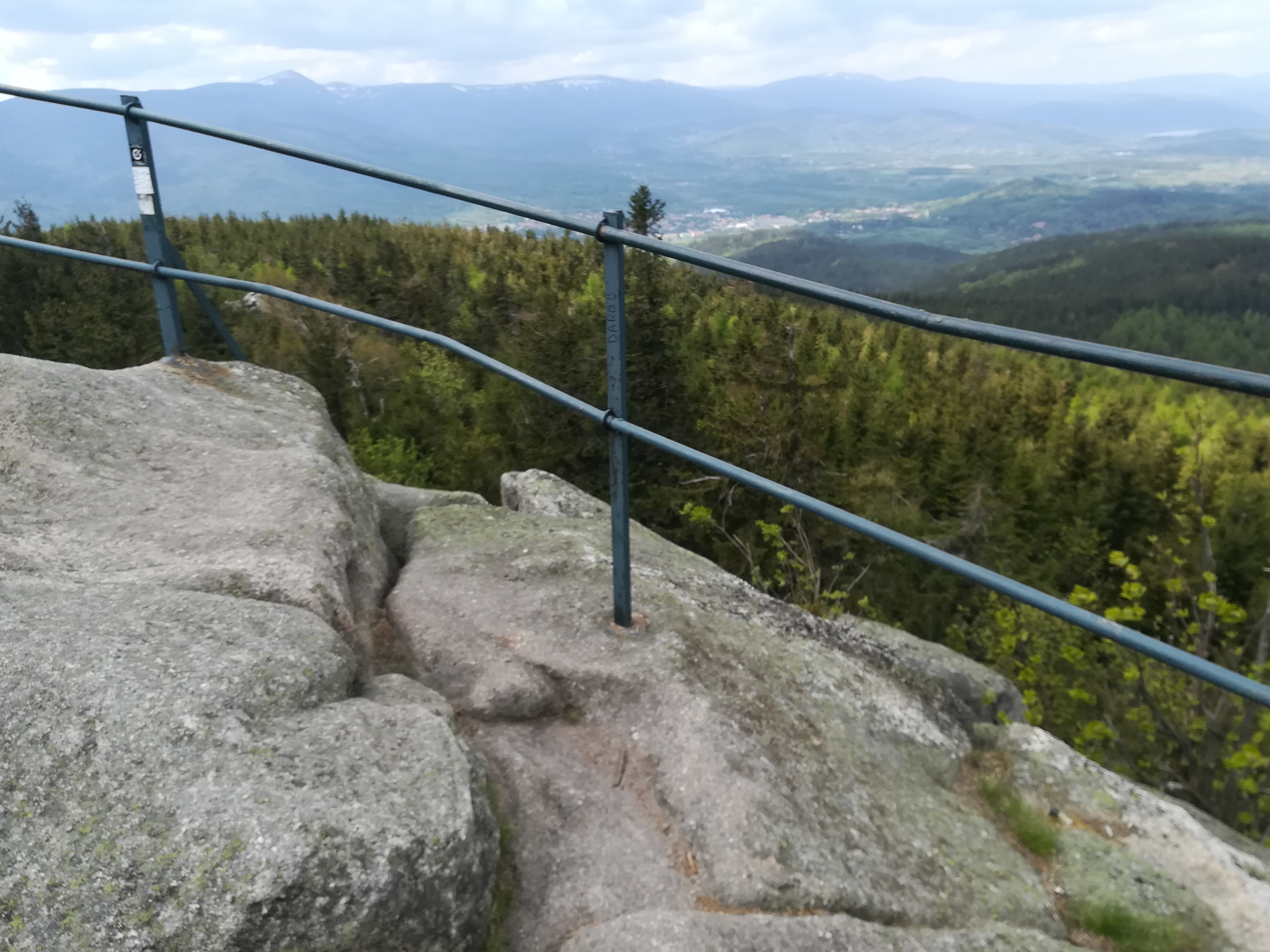 Ostra Mała (Skalnik) - Rudawy Janowickie.